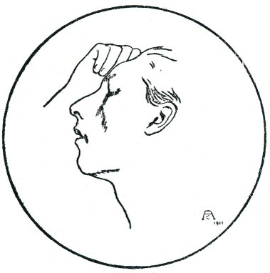 Ex-libris da Renascenca Portuguesa, movimento cultural português surgido em 1912 no Porto (autor: António Carneiro)